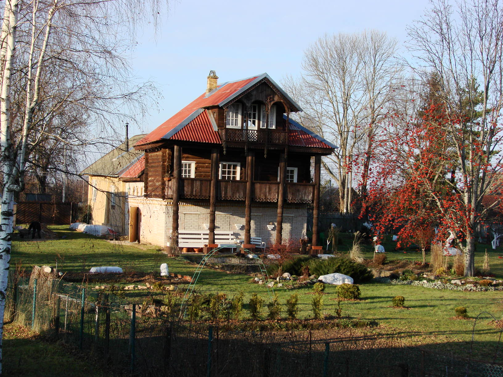 Дом писателя Дмитрия Балашова в деревне Козынево Новгородского района Новгородской области